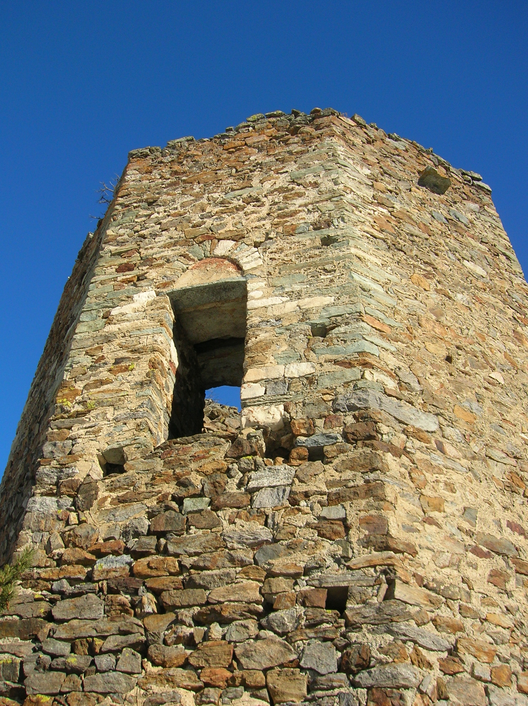 Tornalla o Tour Tornalla, Oyace, Valle d'Aosta, Italia.